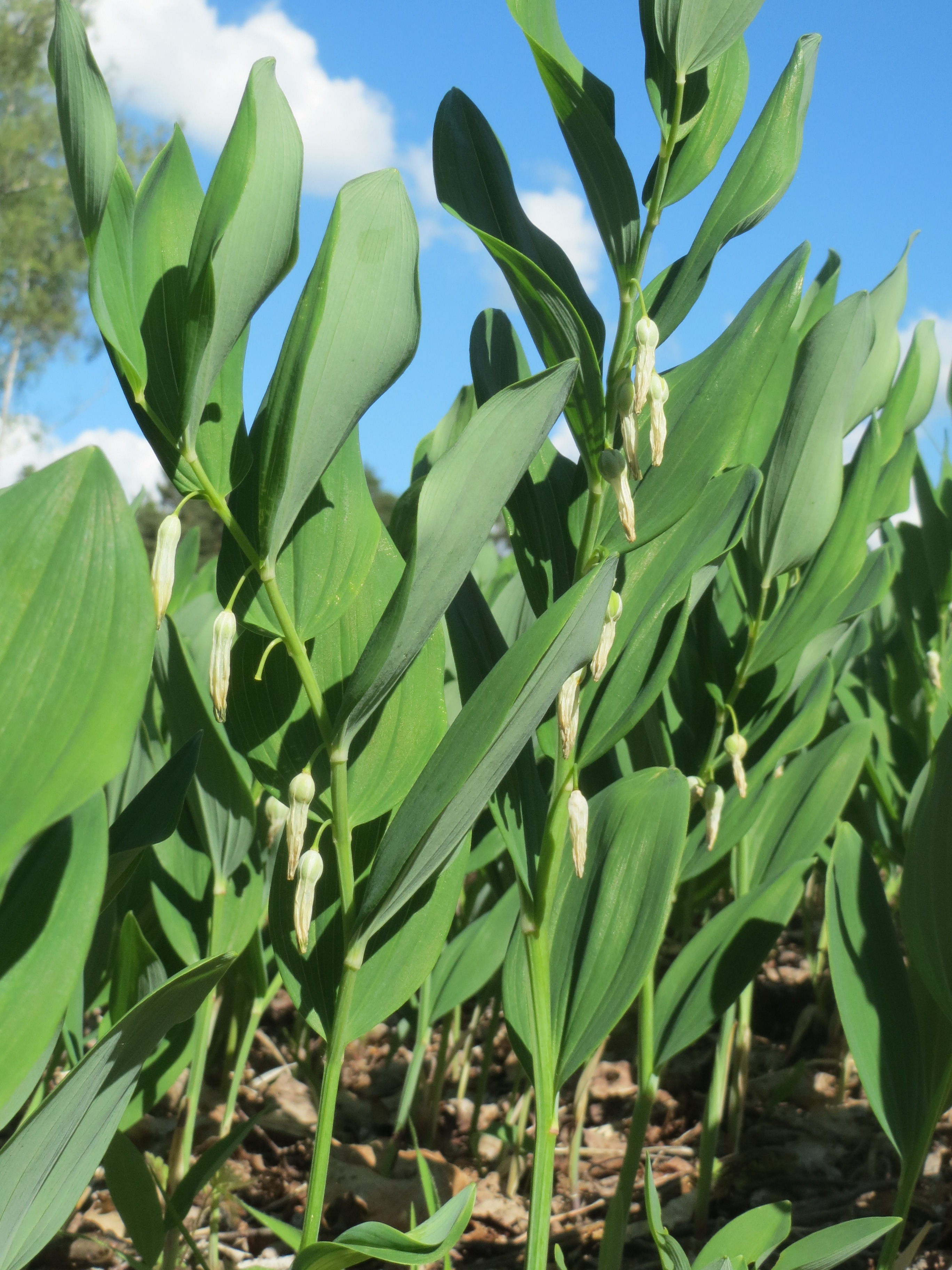 Echtes Salomonssiegel (Polygonatum odoratum) im Naturschutzgebiet Hirschacker und Dossenwald